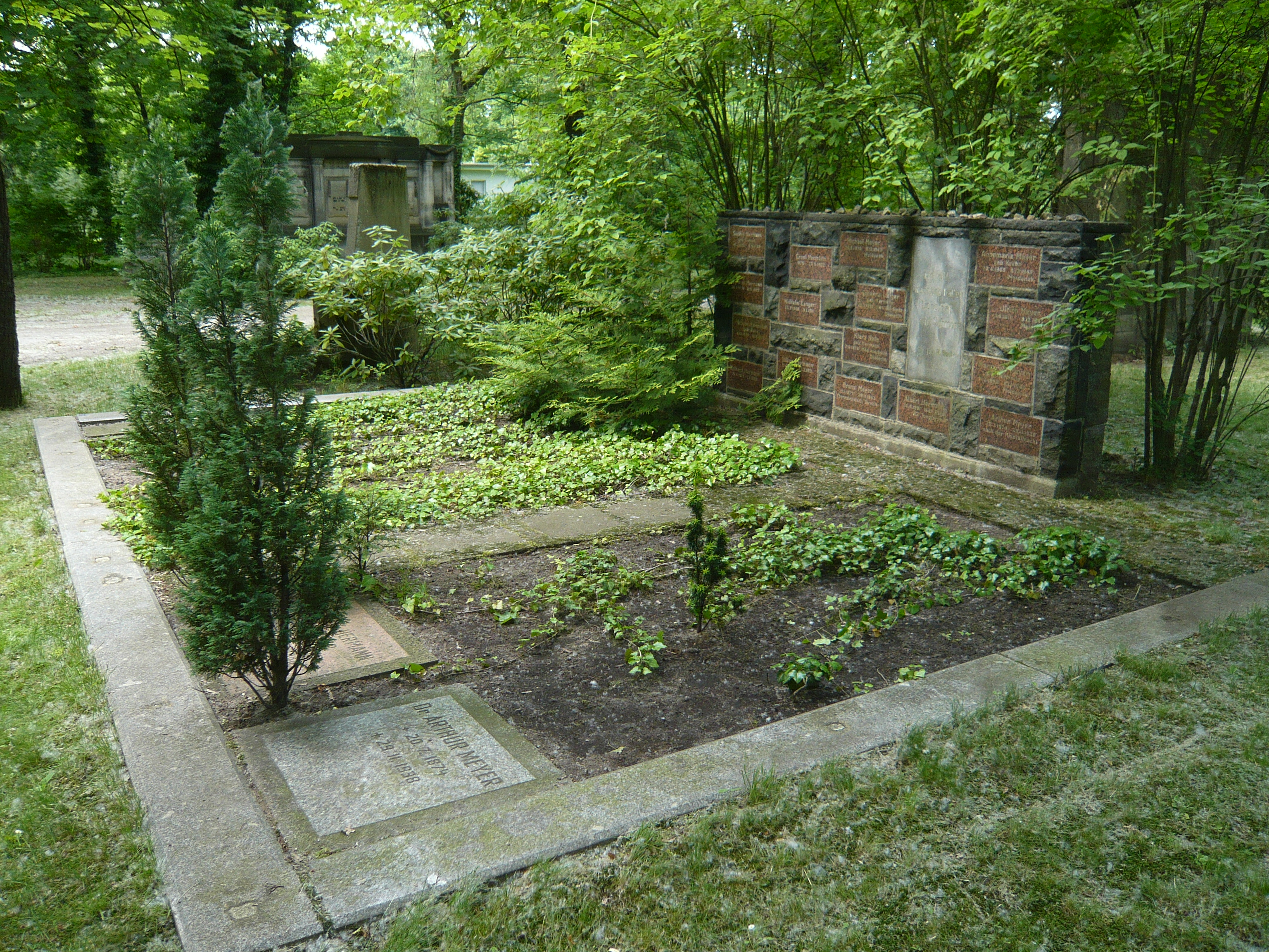 Berlin-Lichtenberg: Ehrengrabstätte Familie Meyer